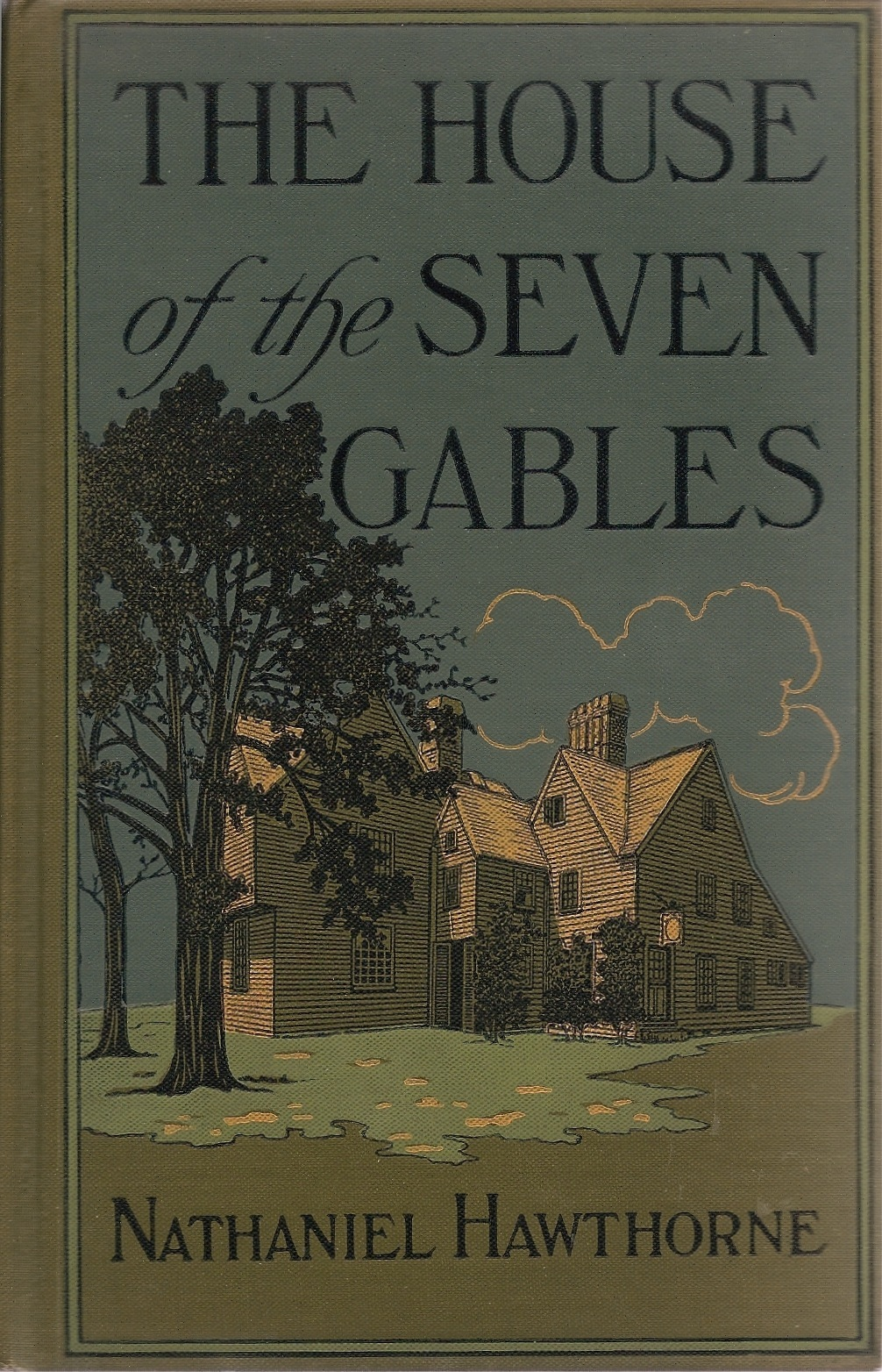 "La Maison aux sept pignons" de Nathaniel Hawthorne. Couverture d'une édition de 1913.